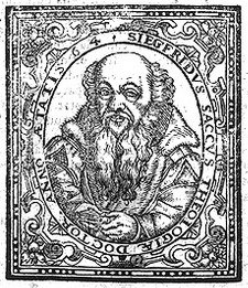 Porträt des Magdeburger Dompredigers Siegfried Sack (1527-1596) (Buchholzschnitt des 16. Jahrhunderts)